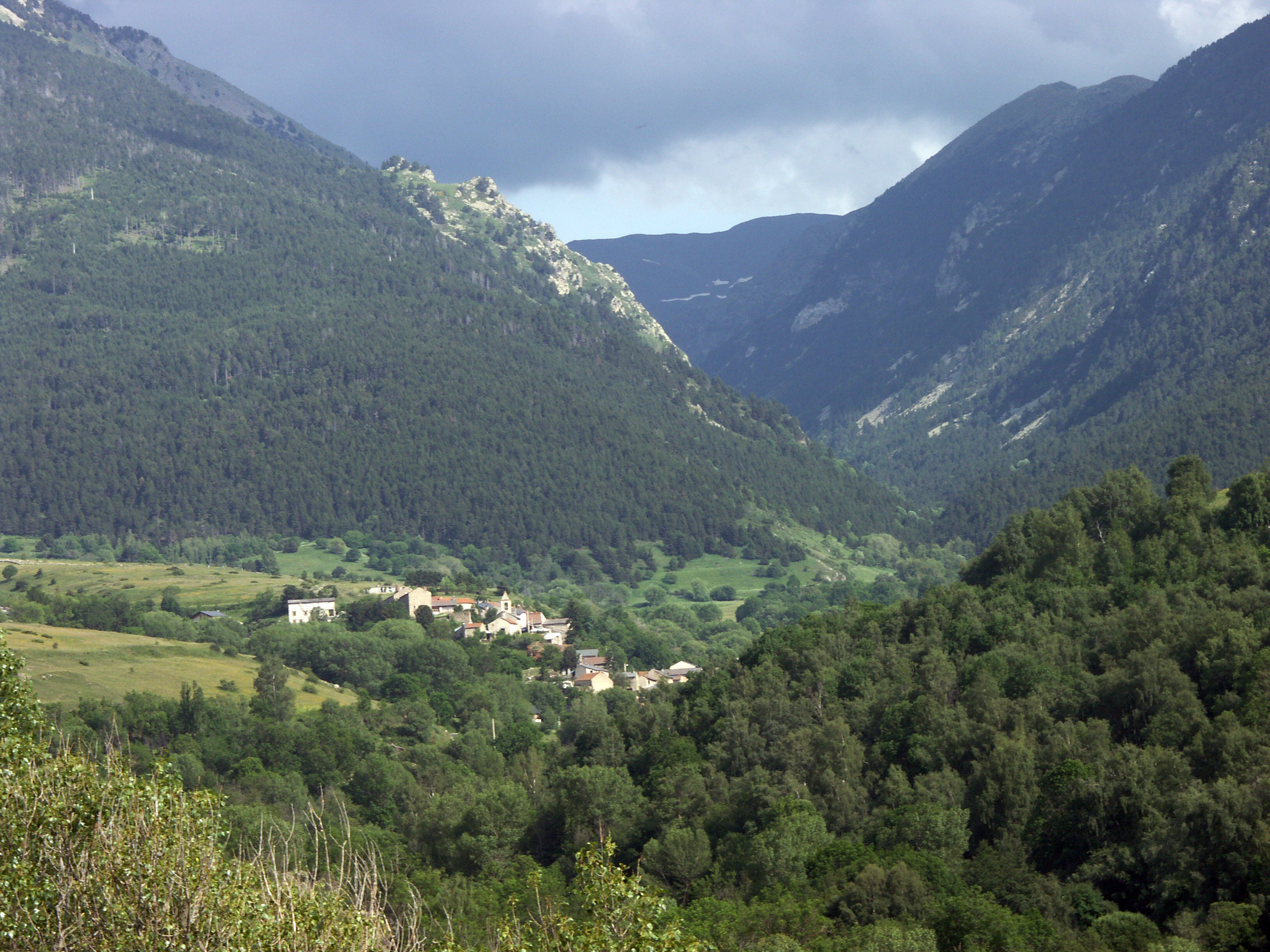 Village d'Eyne